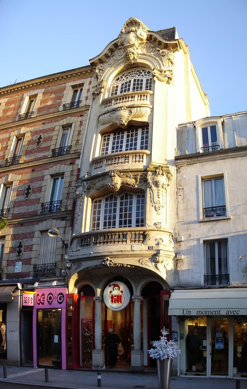 Immeuble « Rococo », 53 Rue du Général-de-Gaulle - Enghien-les-Bains (France)